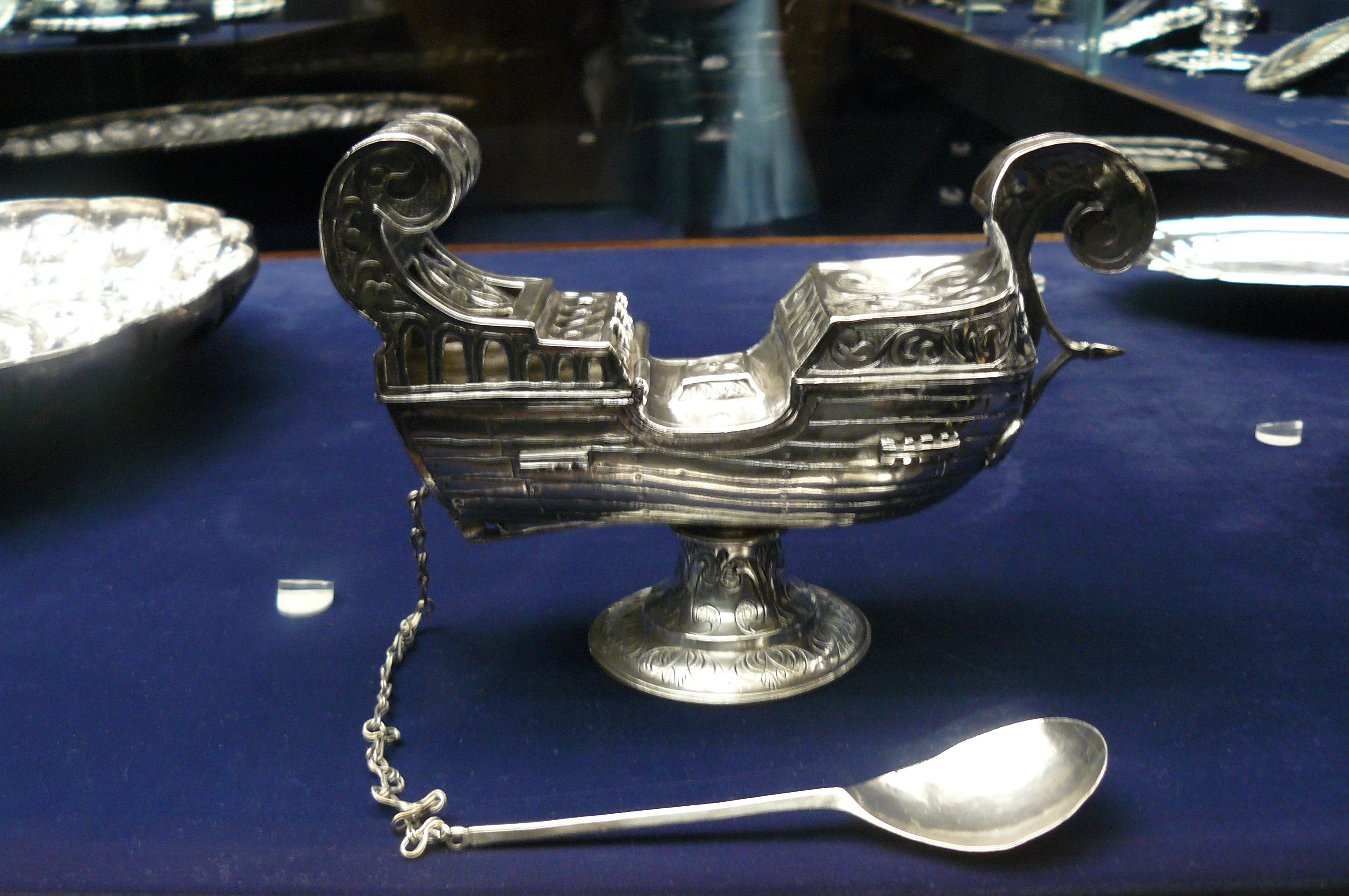 Naveta de prata, Casa Museu Quinta das Cruzes